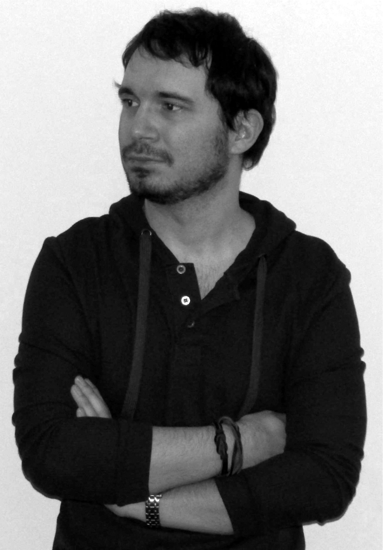 Český spisovatel Aleš Pitzmos, publikující též pod pseudonymy Alec Palmer a Aleš Pospíchal